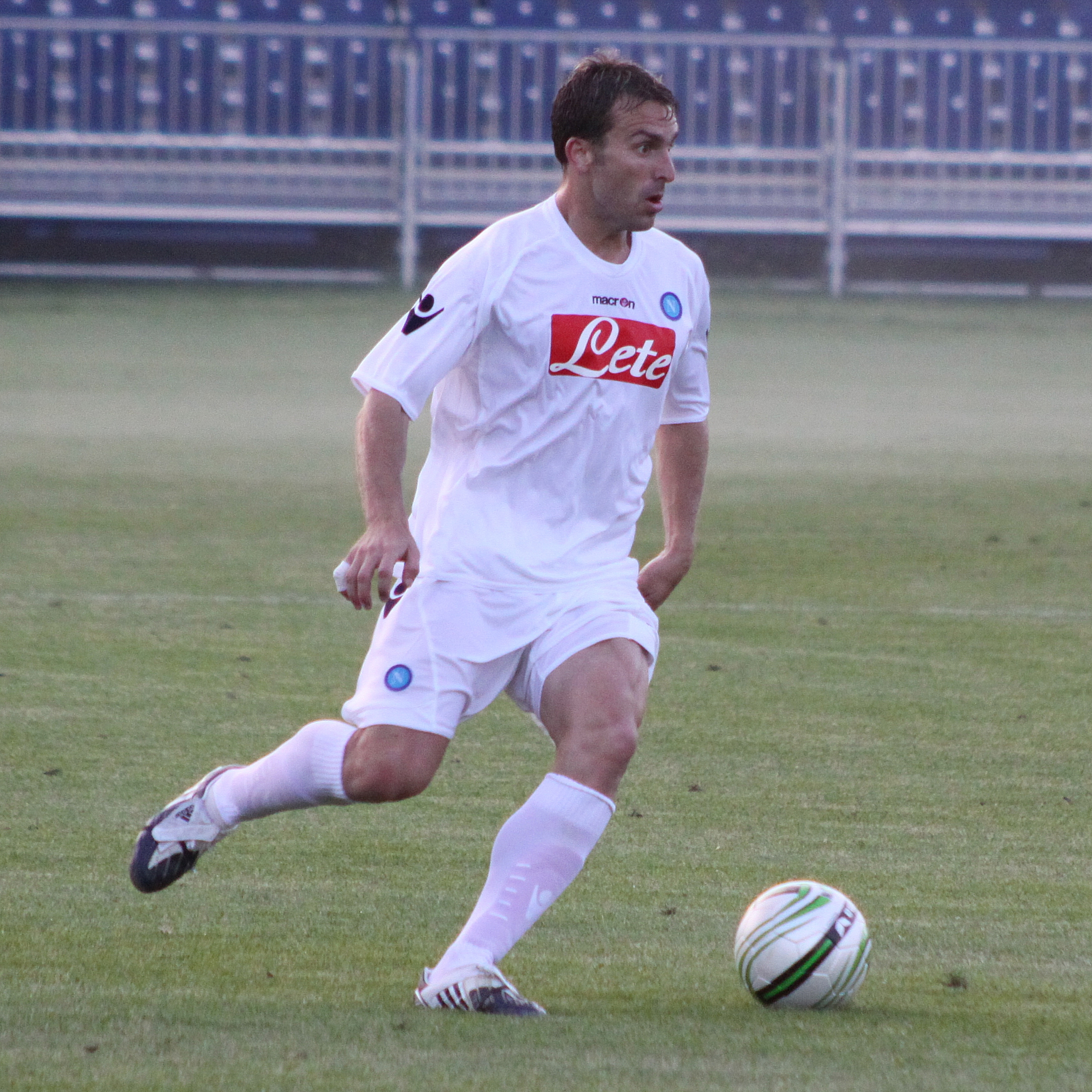 Hugo Campagnaro - SSC Neapel (4) Hugo Campagnaro - Società Sportiva Calcio Napoli